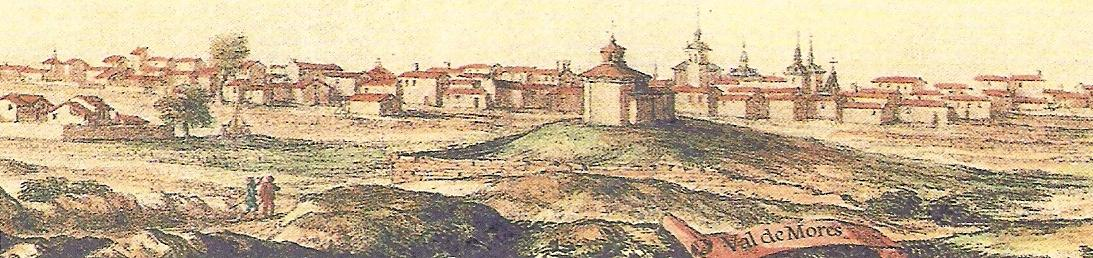 Vista panorámica de Valdemoro en el siglo XVII